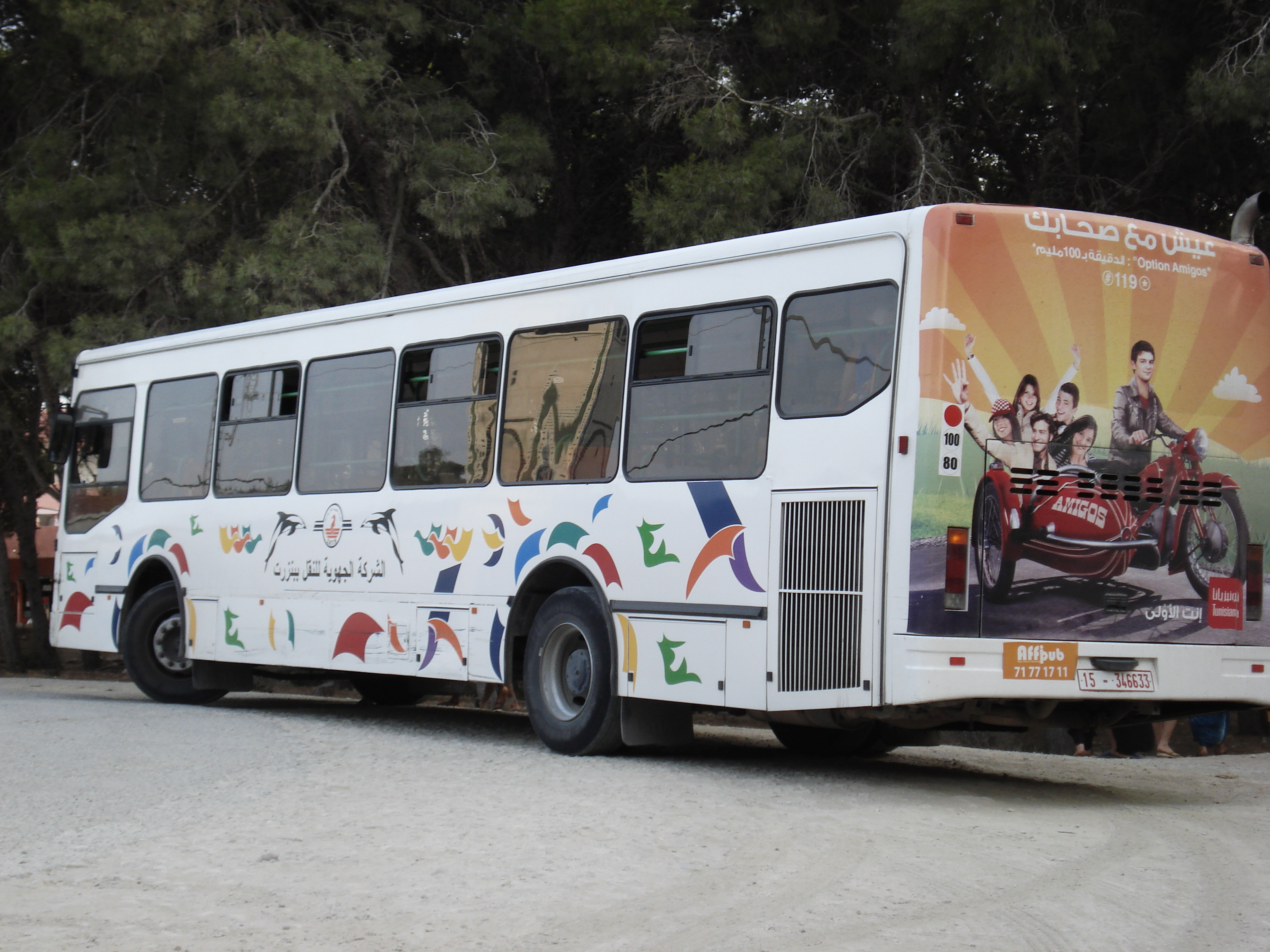 Bus de transport en commun dans le gouvernerat de Bizerte, appartenant à la société régionale de transport de Bizerte, Bizerte, Tunisie